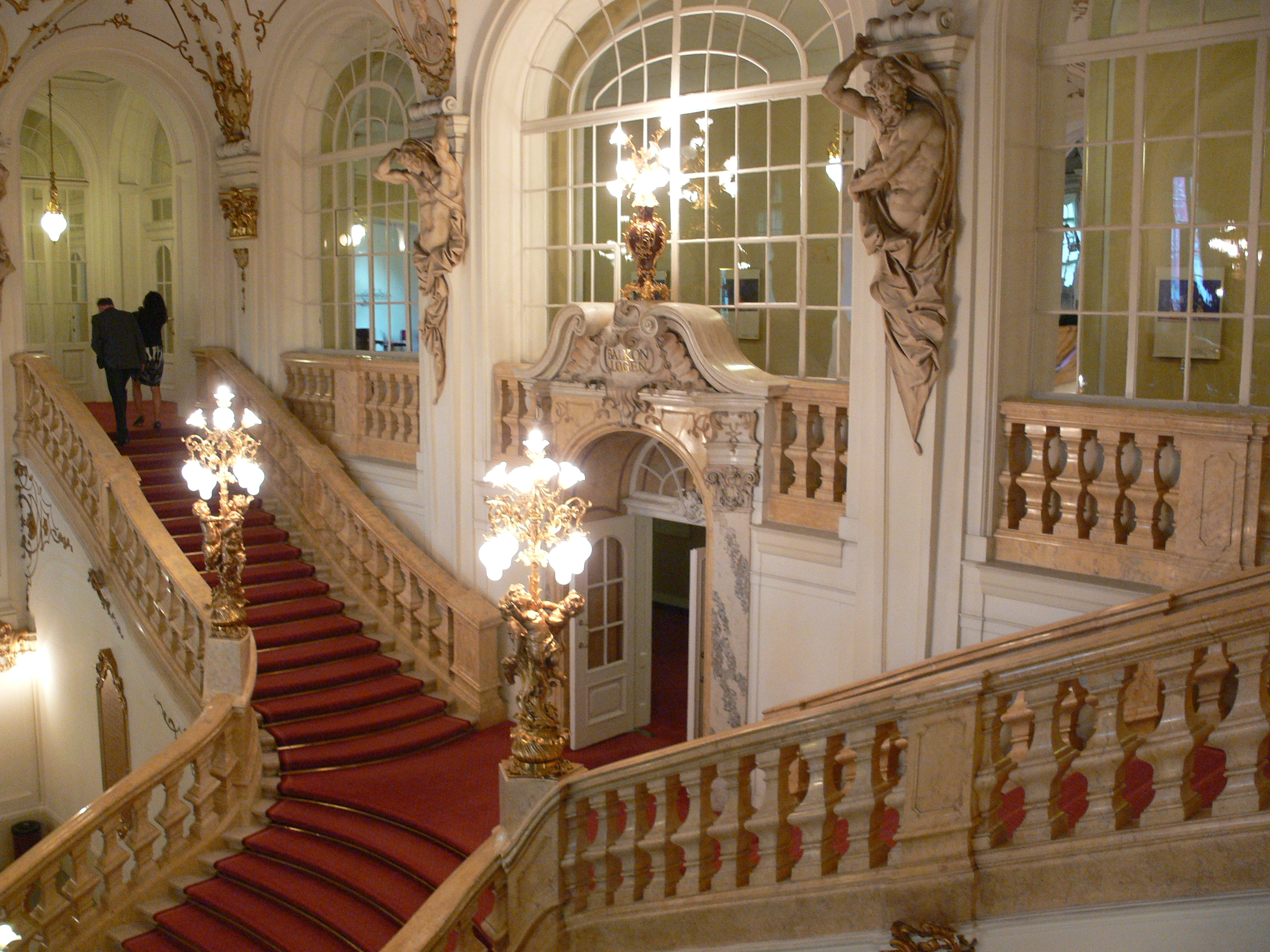 Opernhaus Graz Stiege